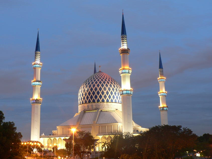 La Mosquée Bleue de Shah Alam, Malaisie, Janvier 2006. Auteur: (WT-fr) Adeline